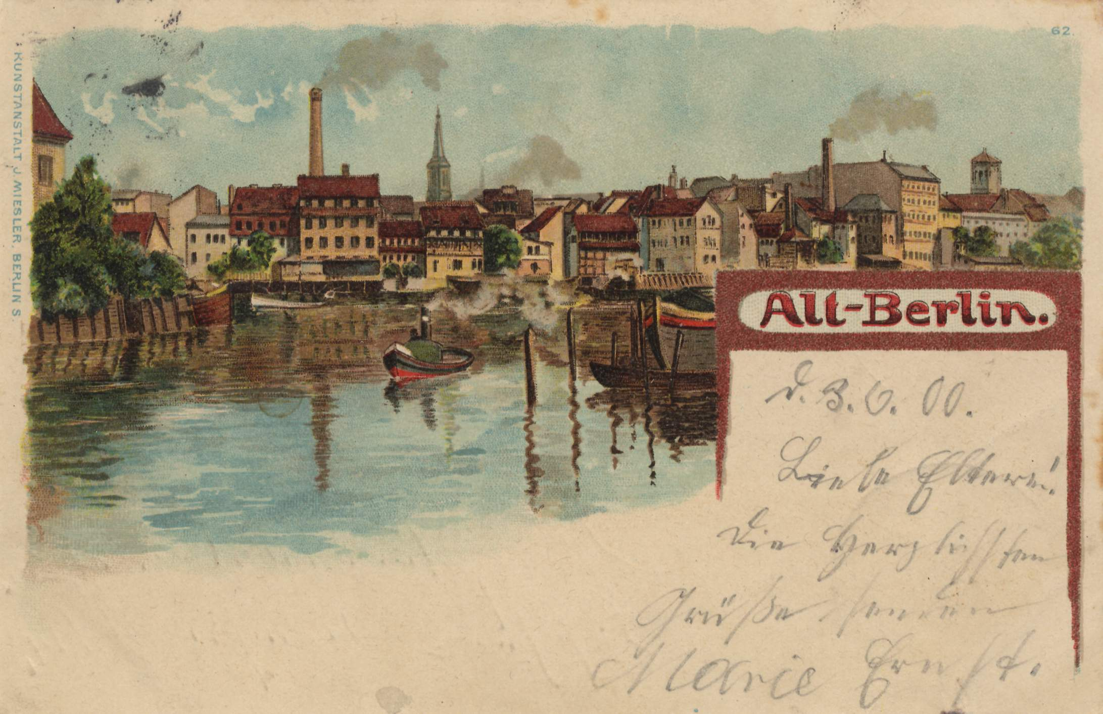 Alt-Berlin